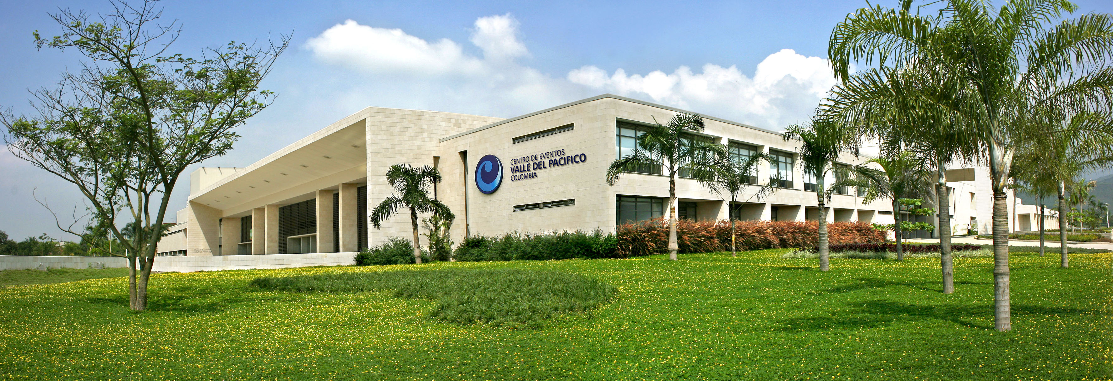 Centro de Eventos Valle del Pacifico